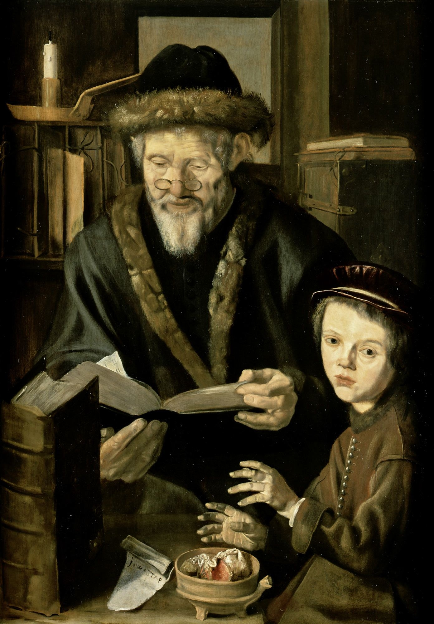 Allegorie des Winters. Öl auf Holz. 84,5 x 59,5 cm.